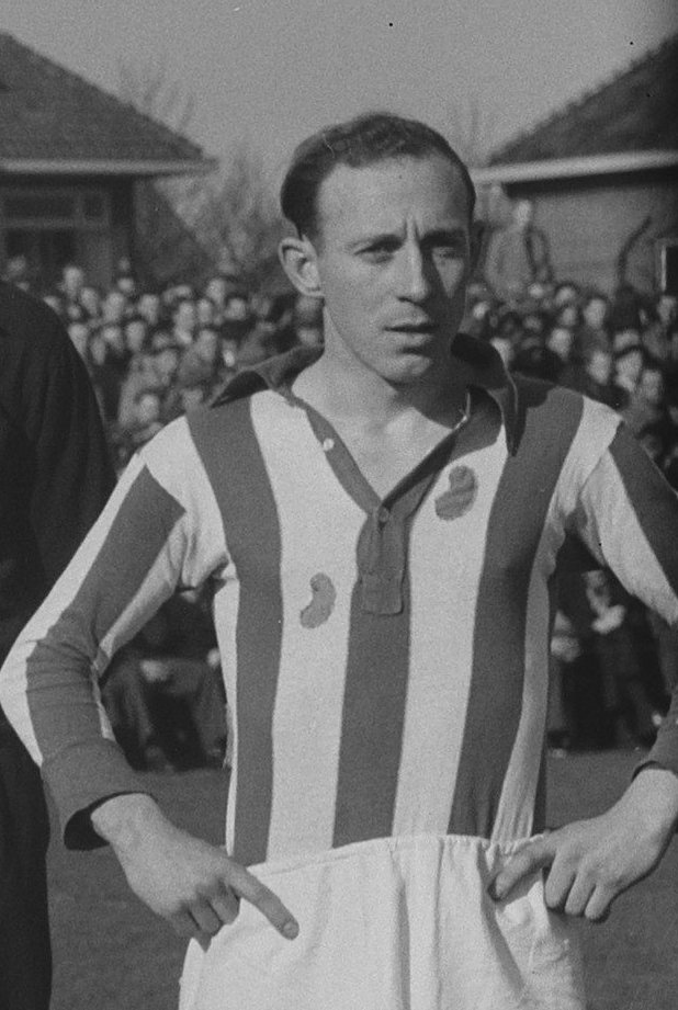 Collectie / Archief : Fotocollectie Anefo Reportage / Serie : [ onbekend ] Beschrijving : Heerenveens elftal voetbal Datum : 4 maart 1951 Trefwoorden : elftallen Fotograaf : Vogel, Carel L. de / Anefo Auteursrechthebbende : Nationaal Archief Materiaalsoort : Glasnegatief Nummer archiefinventaris : bekijk toegang 2.24.01.09 Bestanddeelnummer : 904-4556